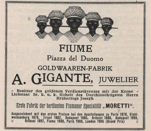 Pubblictà della gioielleria Agostino Gigante di Fiume